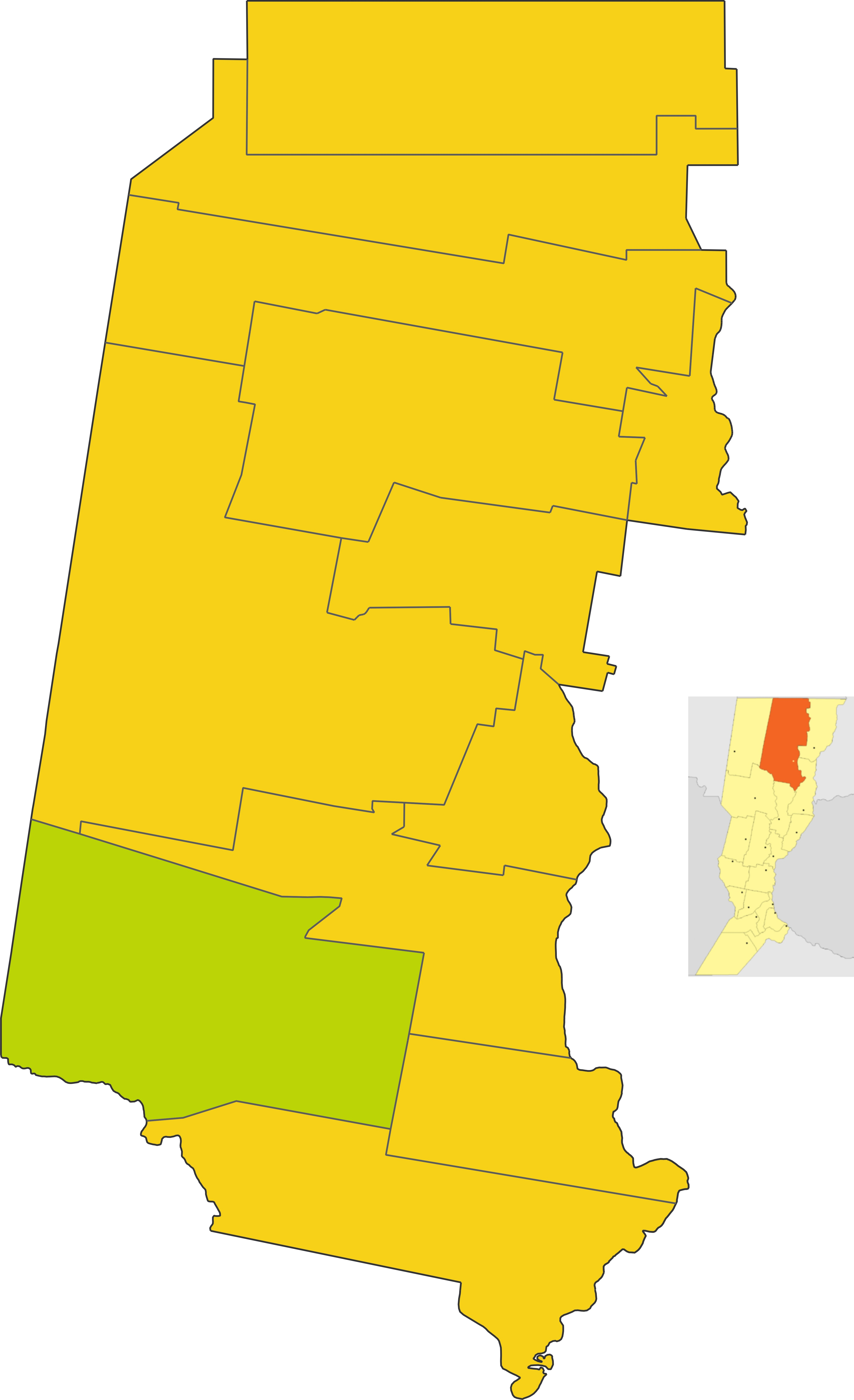 Map of the comuna de La Gallareta in Vera department, Santa fe province, Argentina